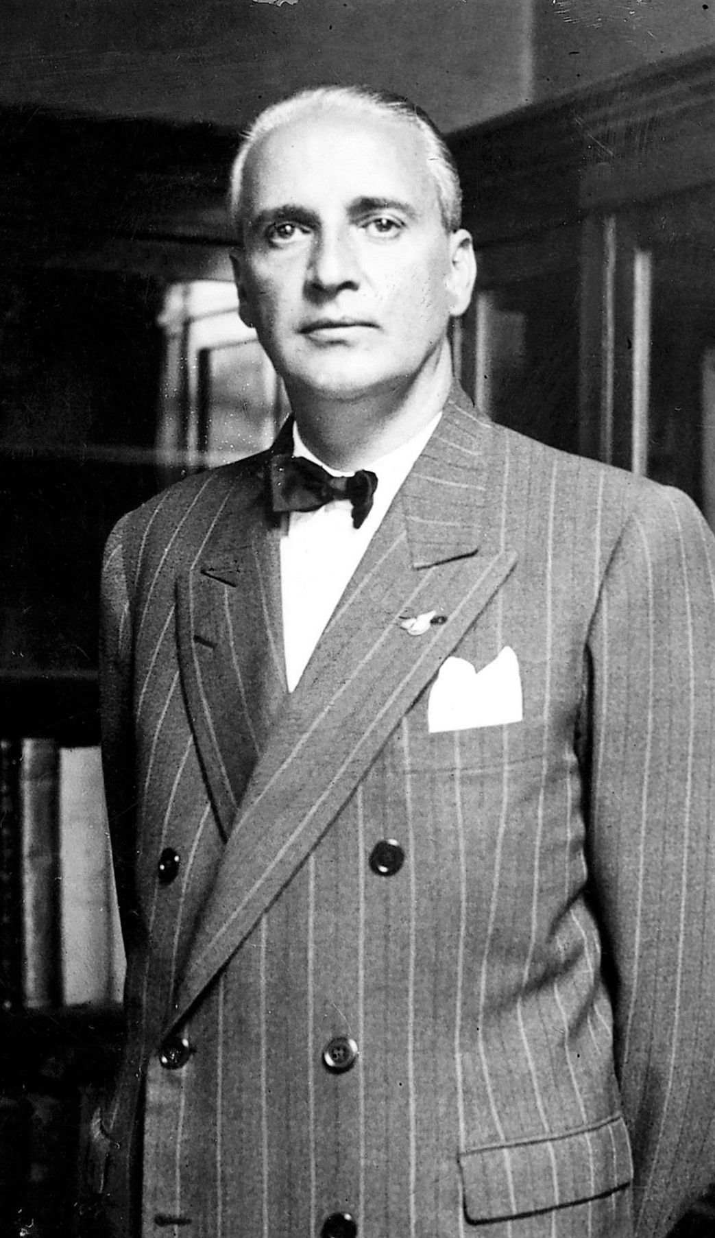 Dr. Alfeo Brum. Vicepresidente de la República Oriental del Uruguay